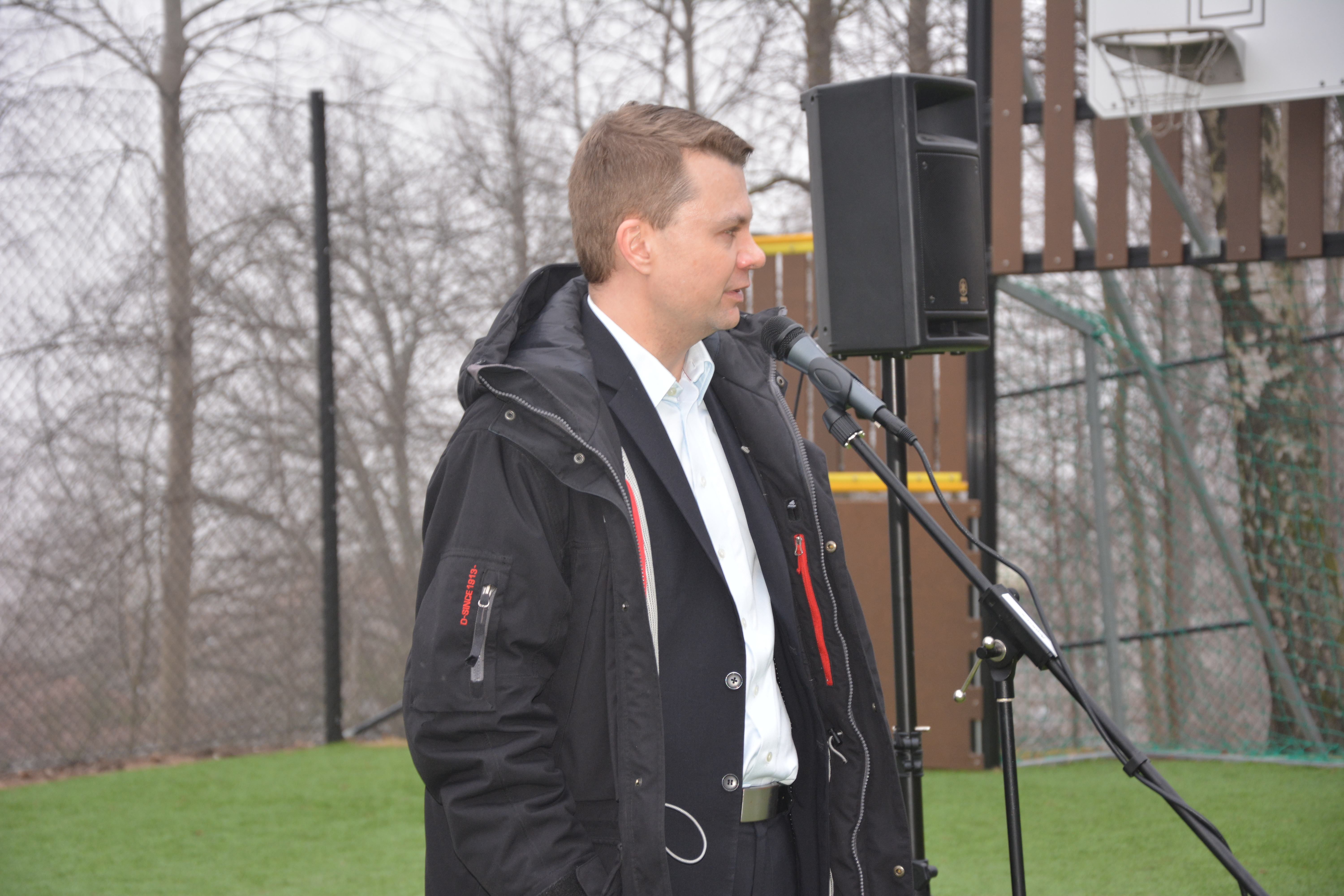 Bergdalskolan invigning 27 februari 2014